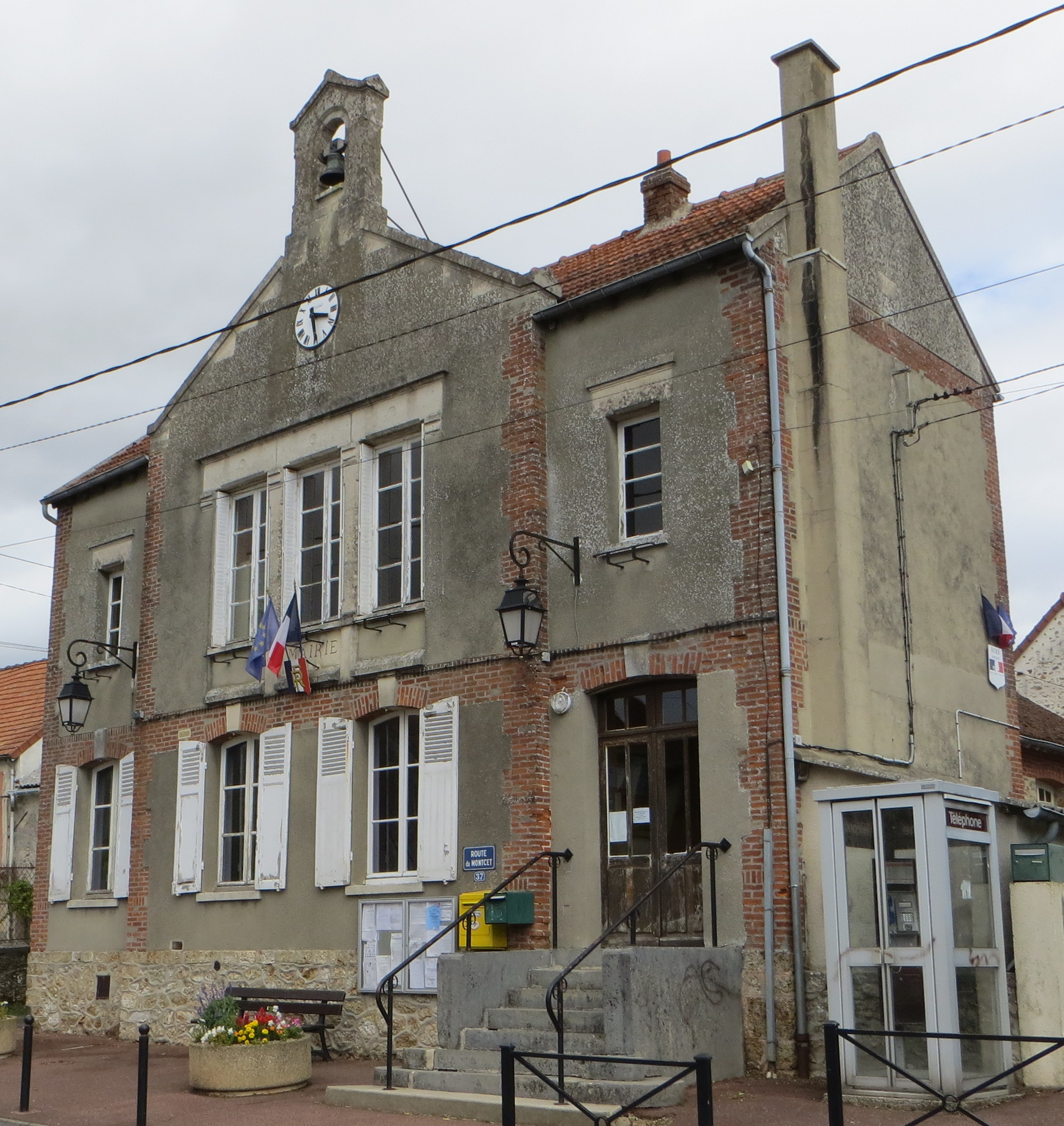 Mairie-école